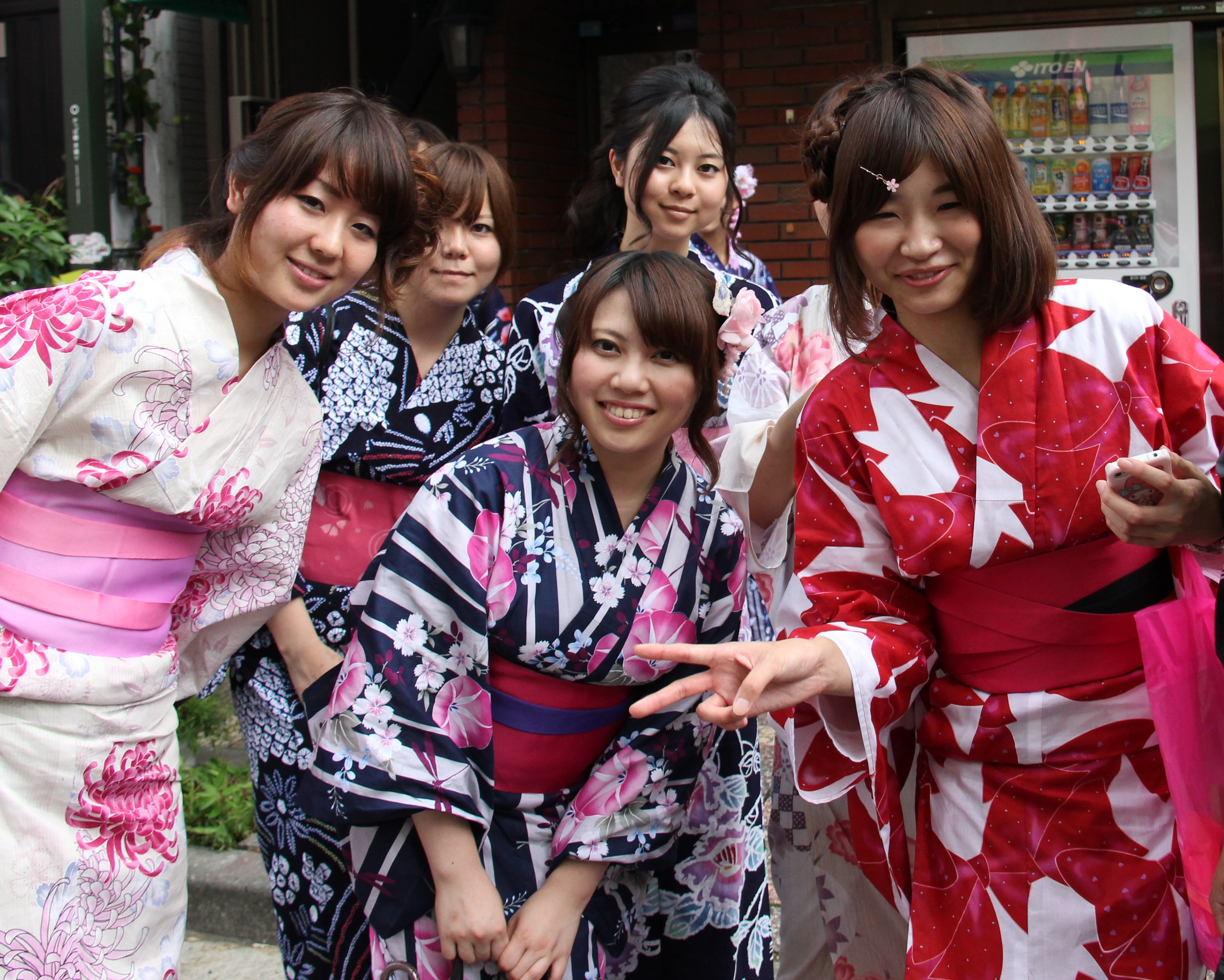 Shitamachi Tanabata Matsuri